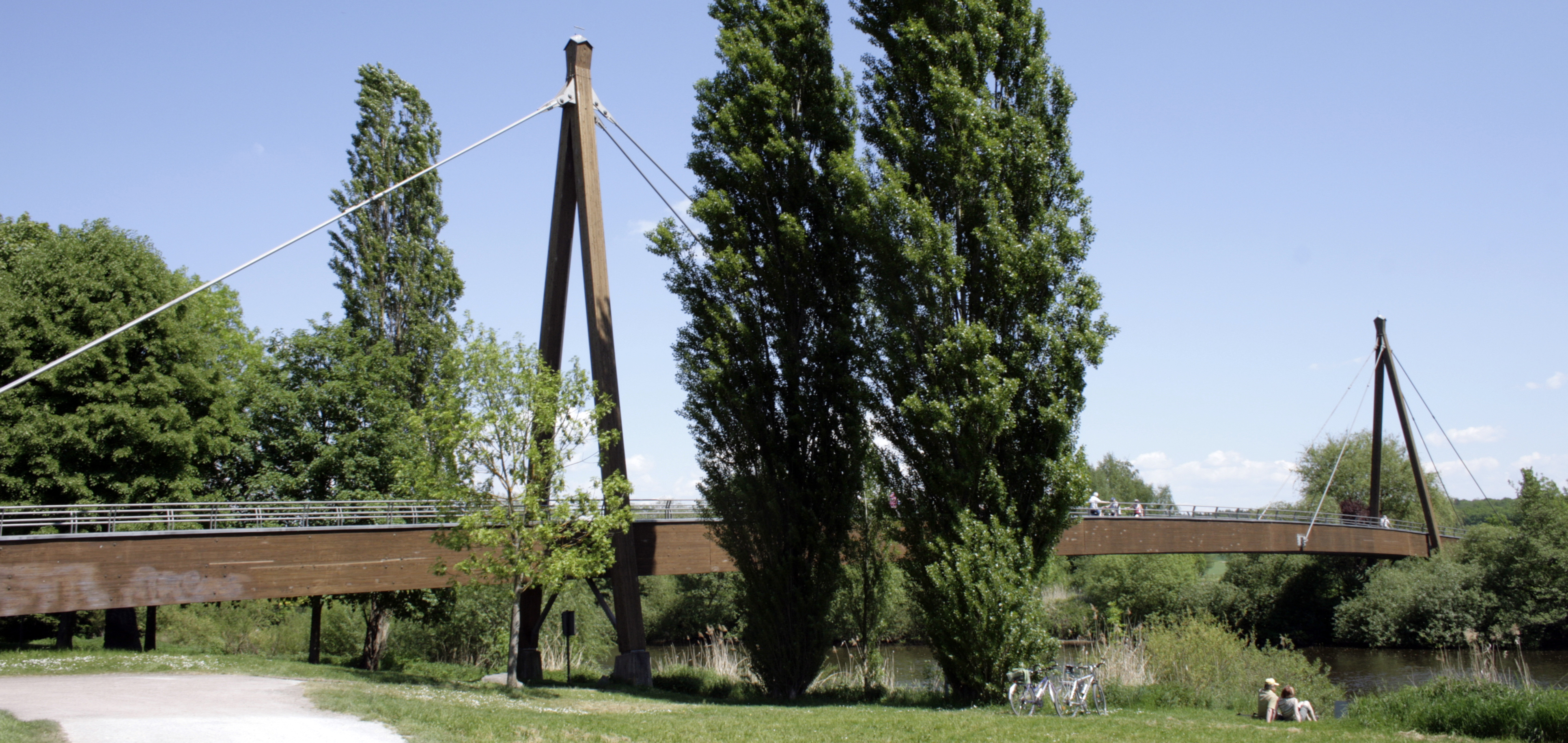 Fußgänger- und Fahrradbrücke zwischen Dietkirchen und Eschhofen, Deutschland